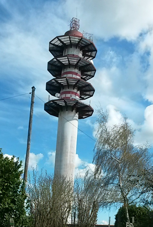 Tour hertzienne de la Grillère (80m)